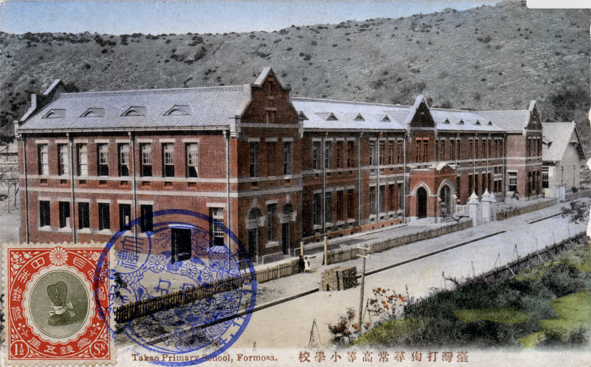 位於湊町的臺灣打狗尋常高等小學校，為高雄市鼓山國小前身。